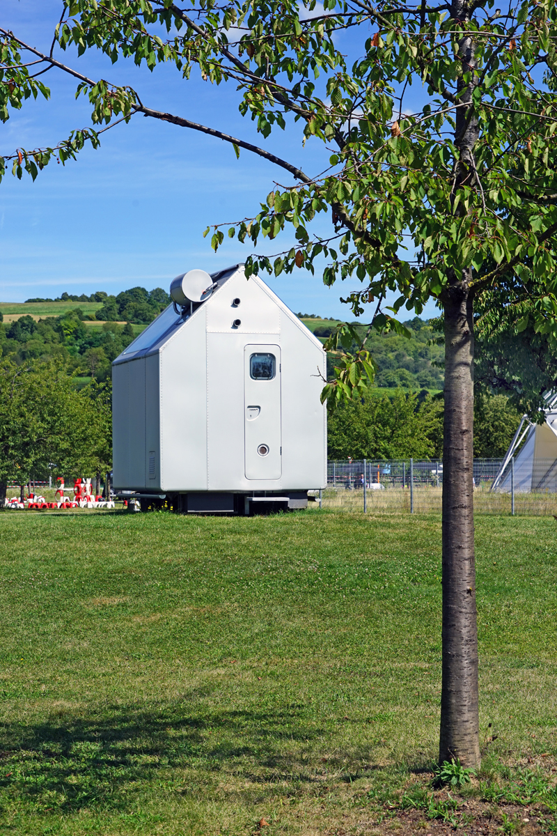 vue extérieure de Diogène de Renzo Piano